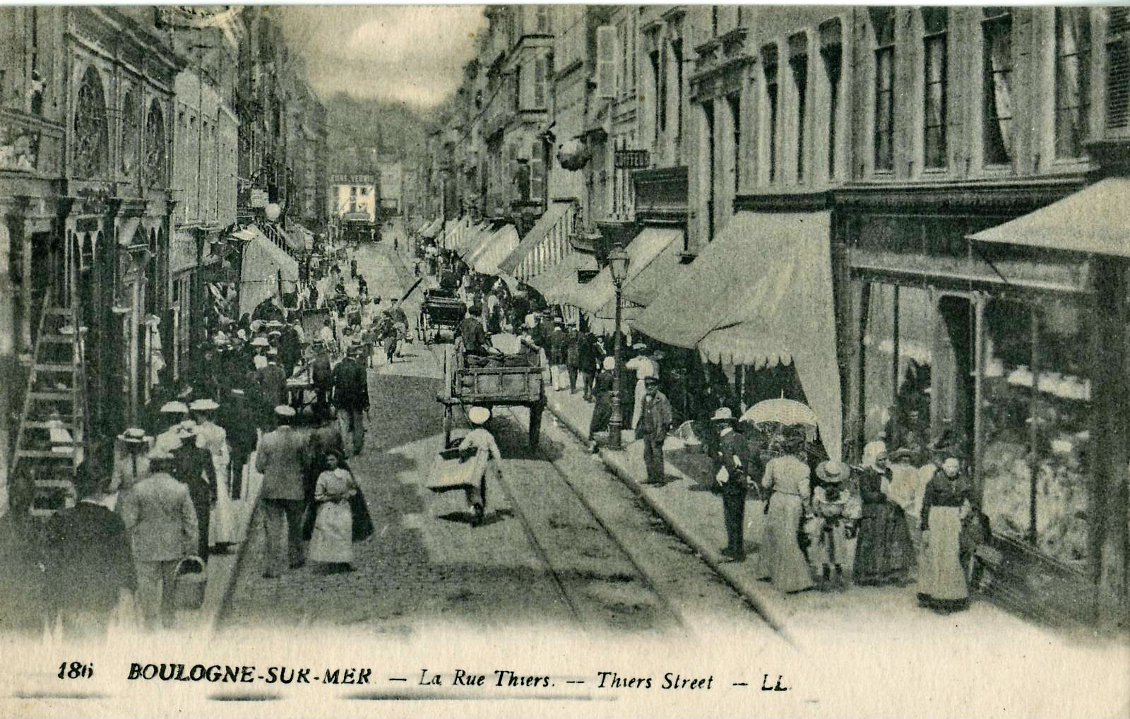 Carte postale ancienne é&ditée par LL, n°186 : BOULOGNE-SUR-MER - La rue Thiers